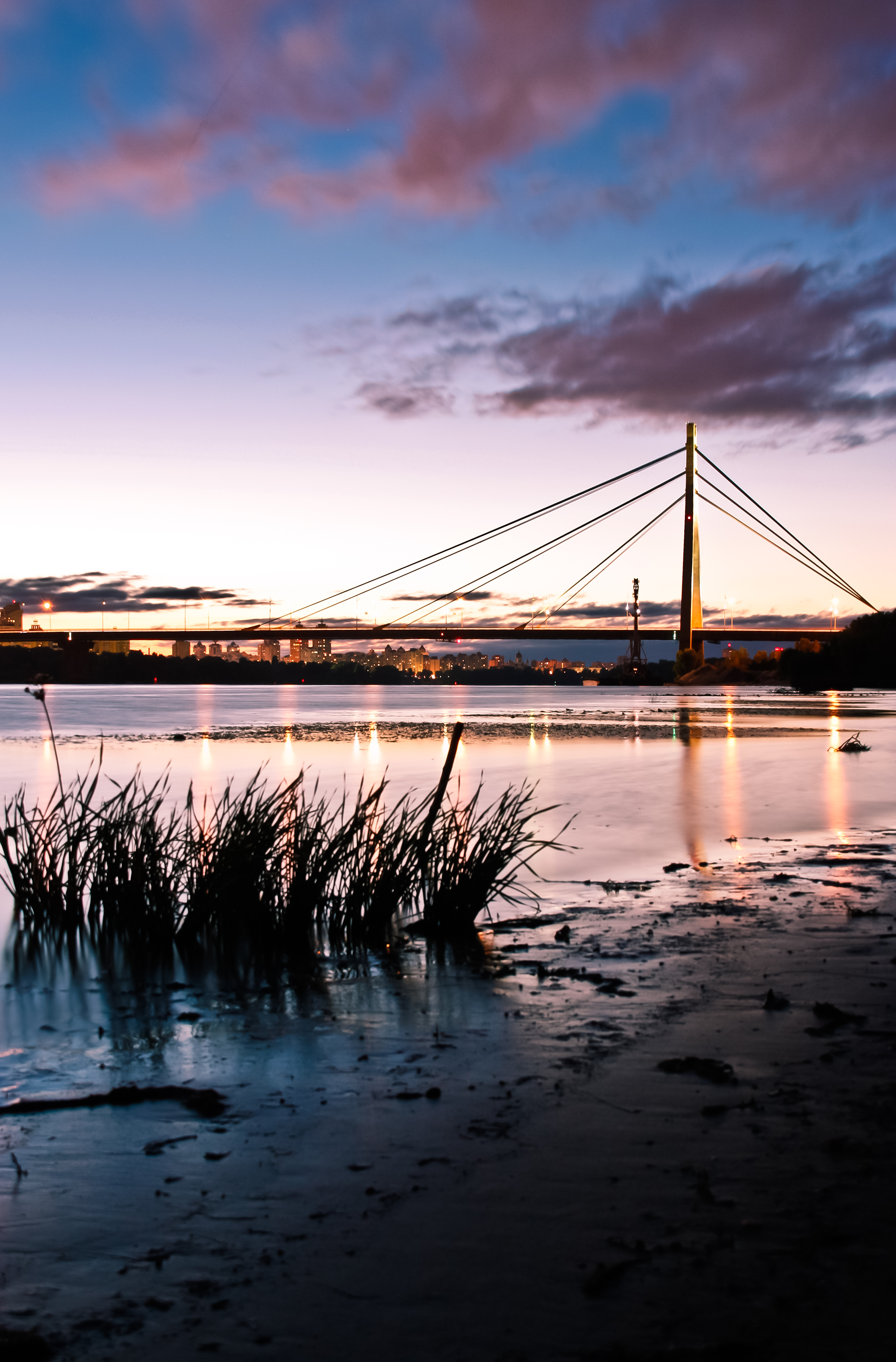 Московський міст, Київ, Московський просп.